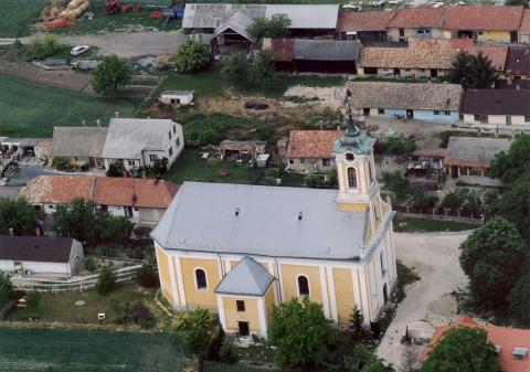 Polgárdi, Hungary, aerialphotography